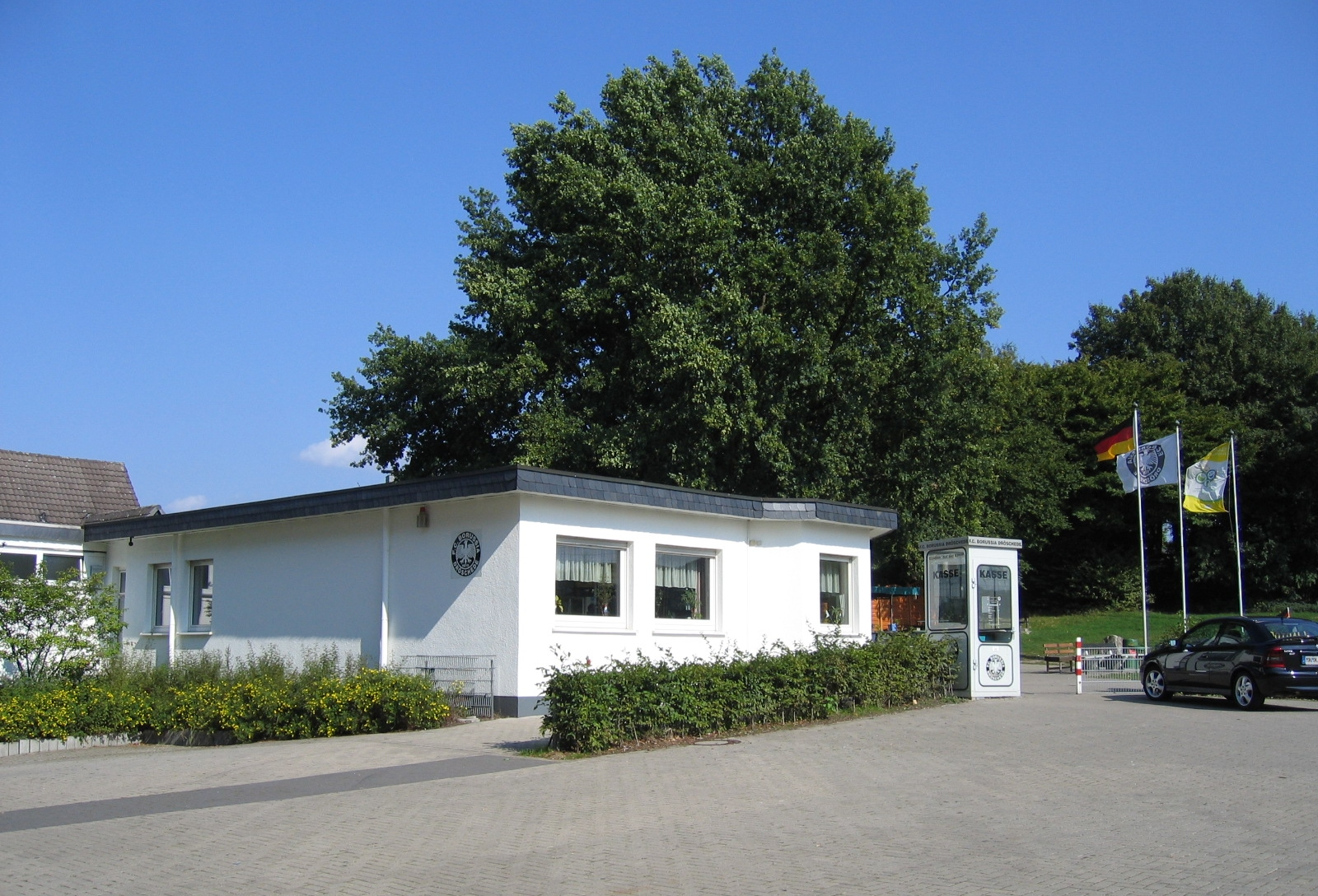 Vereinsheim des F. C. Borussia Dröschede in Iserlohn-Dröschede.